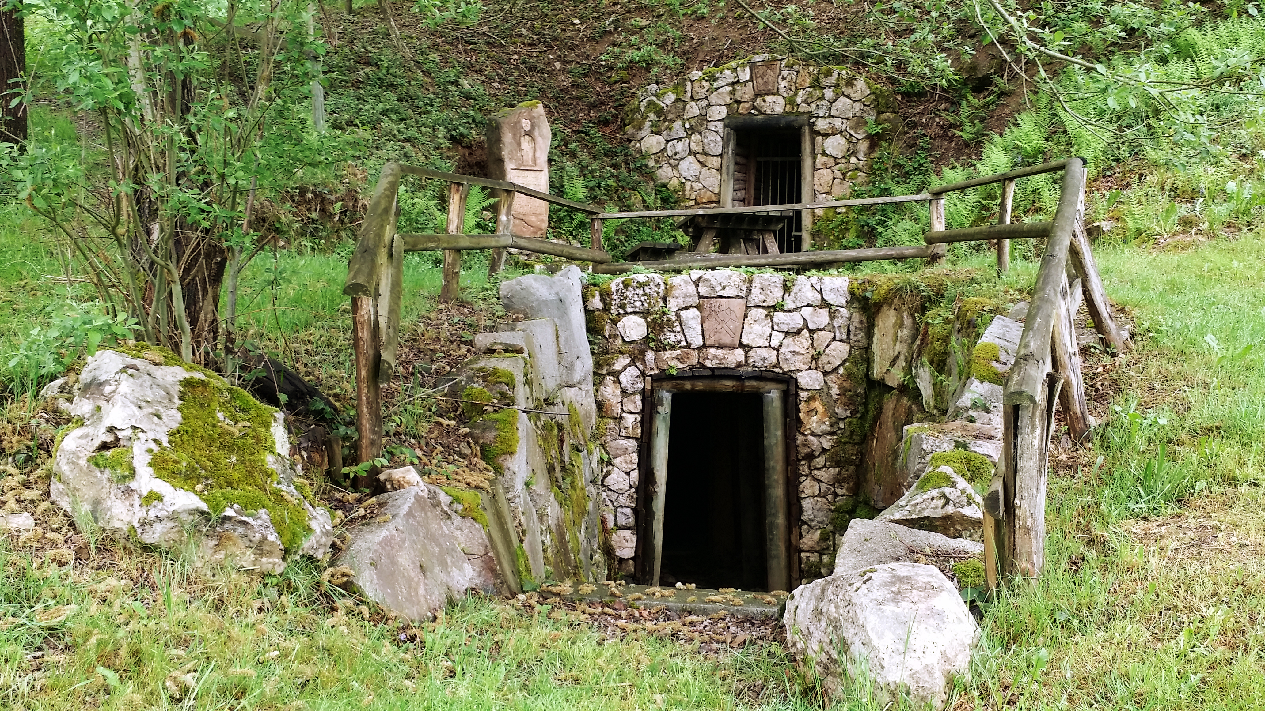 Oberer und Unterer Stollen des Bergwerkes Silbergründle.